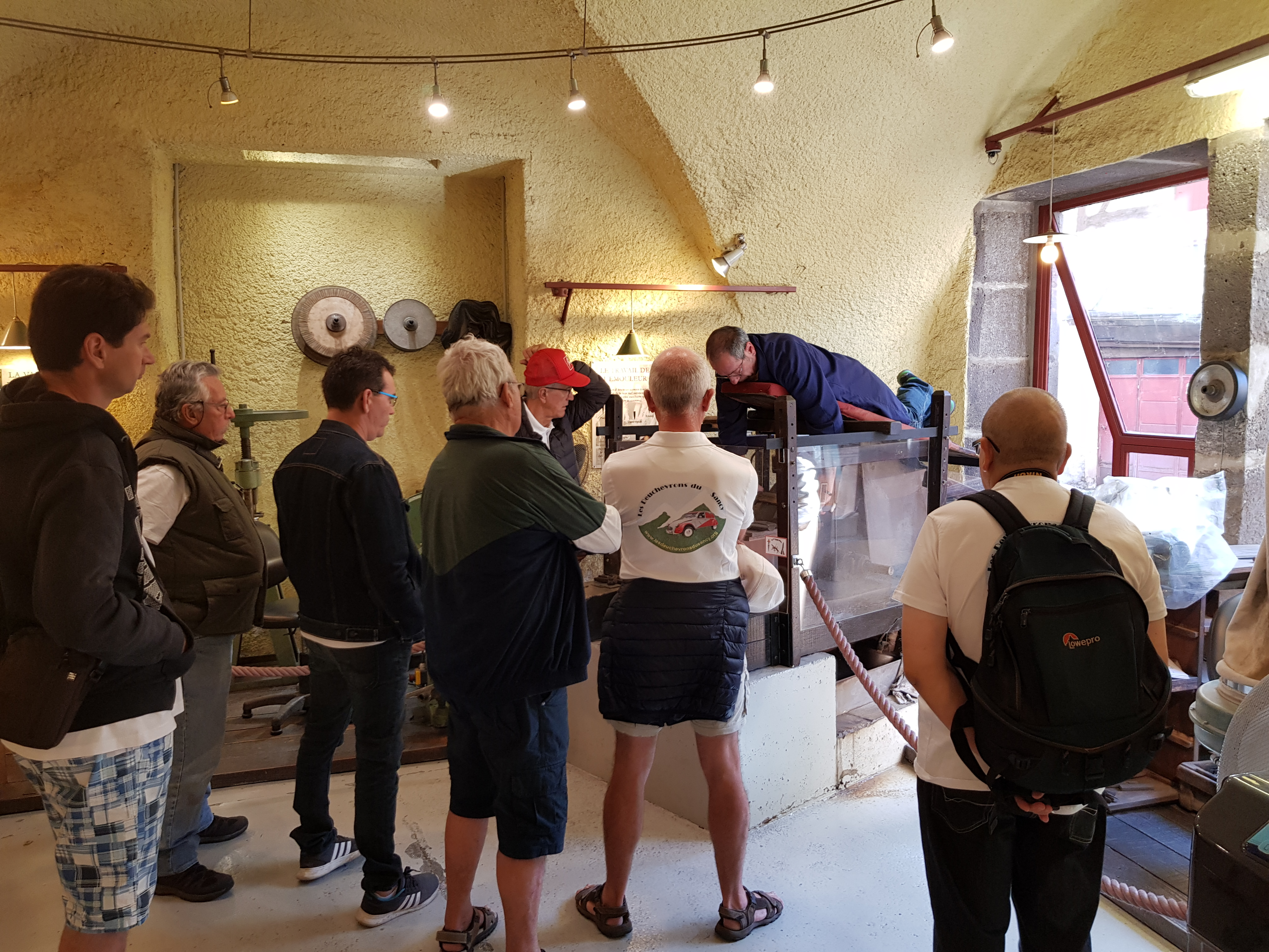 Démonstrations d'émouture au Musée de la Coutellerie de Thiers